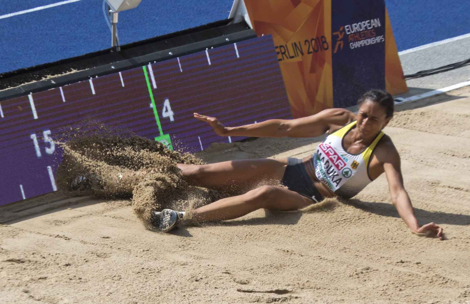 EKB21151 maduka